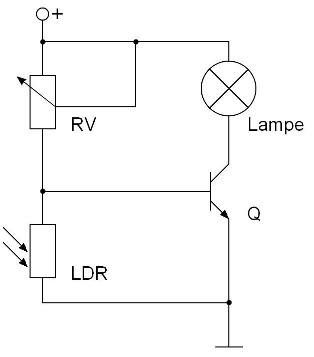 Sehr einfacher Dämmerungsschalter, vorhandenen Schaltplan neu gezeichnet, und dabei etwas an die aktuellen Normen angepasst.